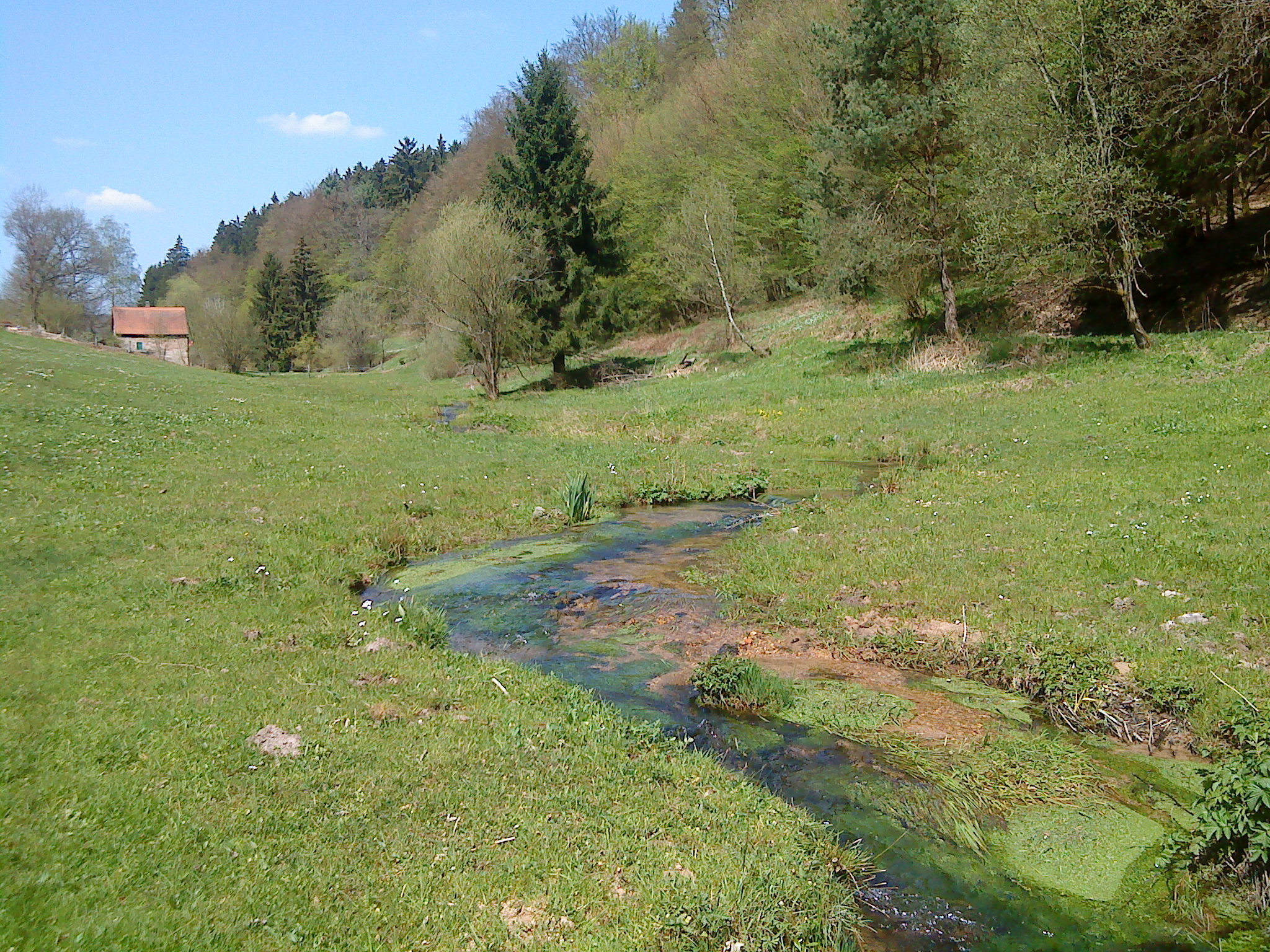 Der Flörsbach zwischen Kempfenbrunn und Flörsbach